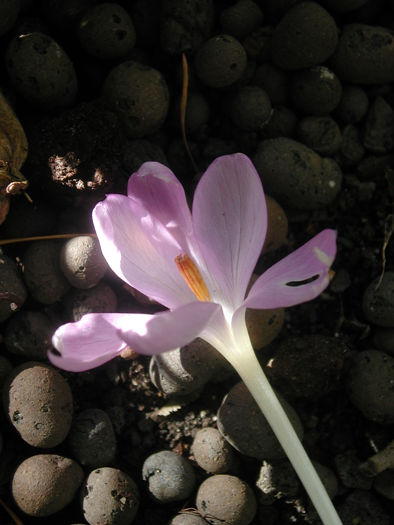 Fleur de "Crocus goulimyi"